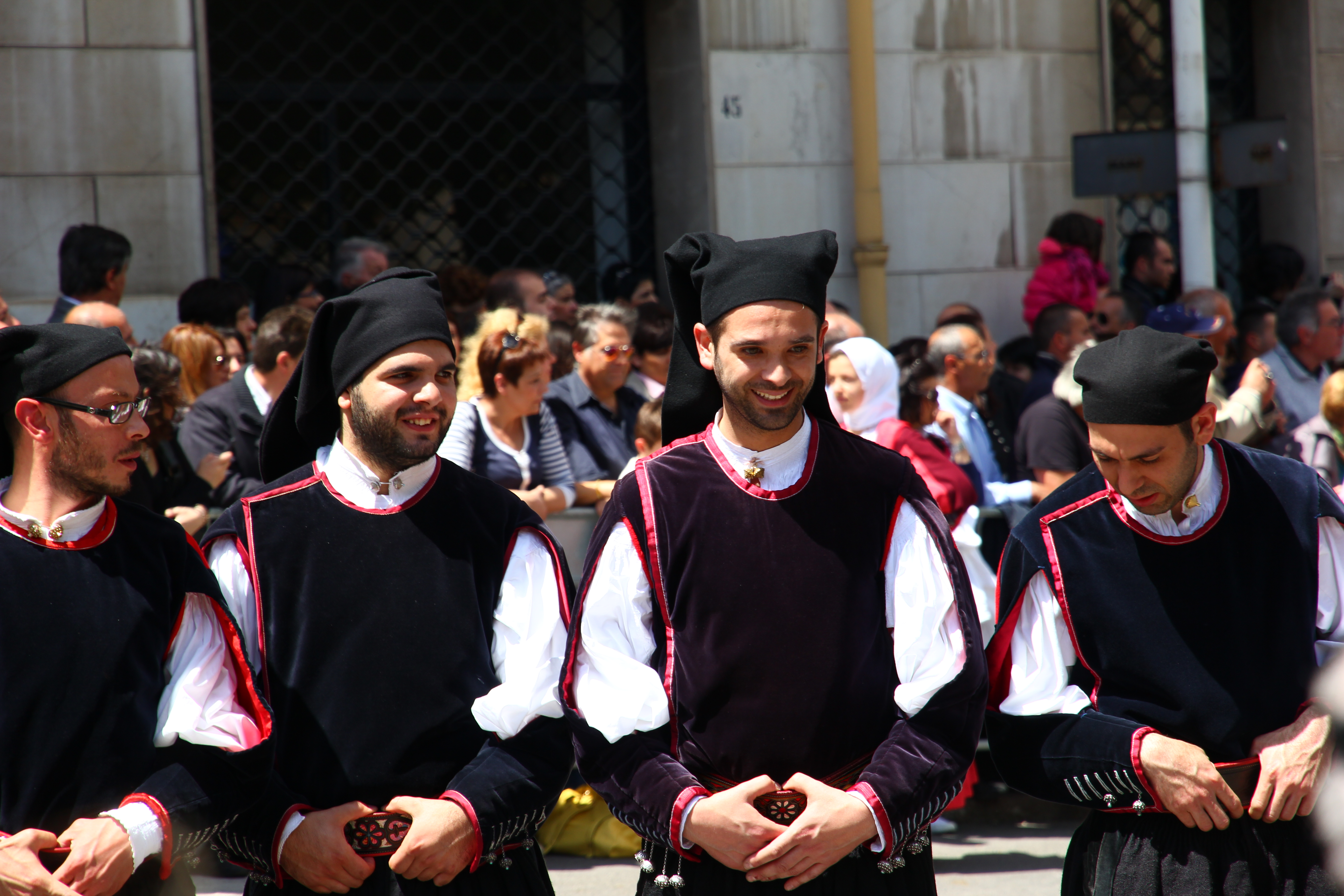 Cavalcata Sarda 2013 (Sassari)